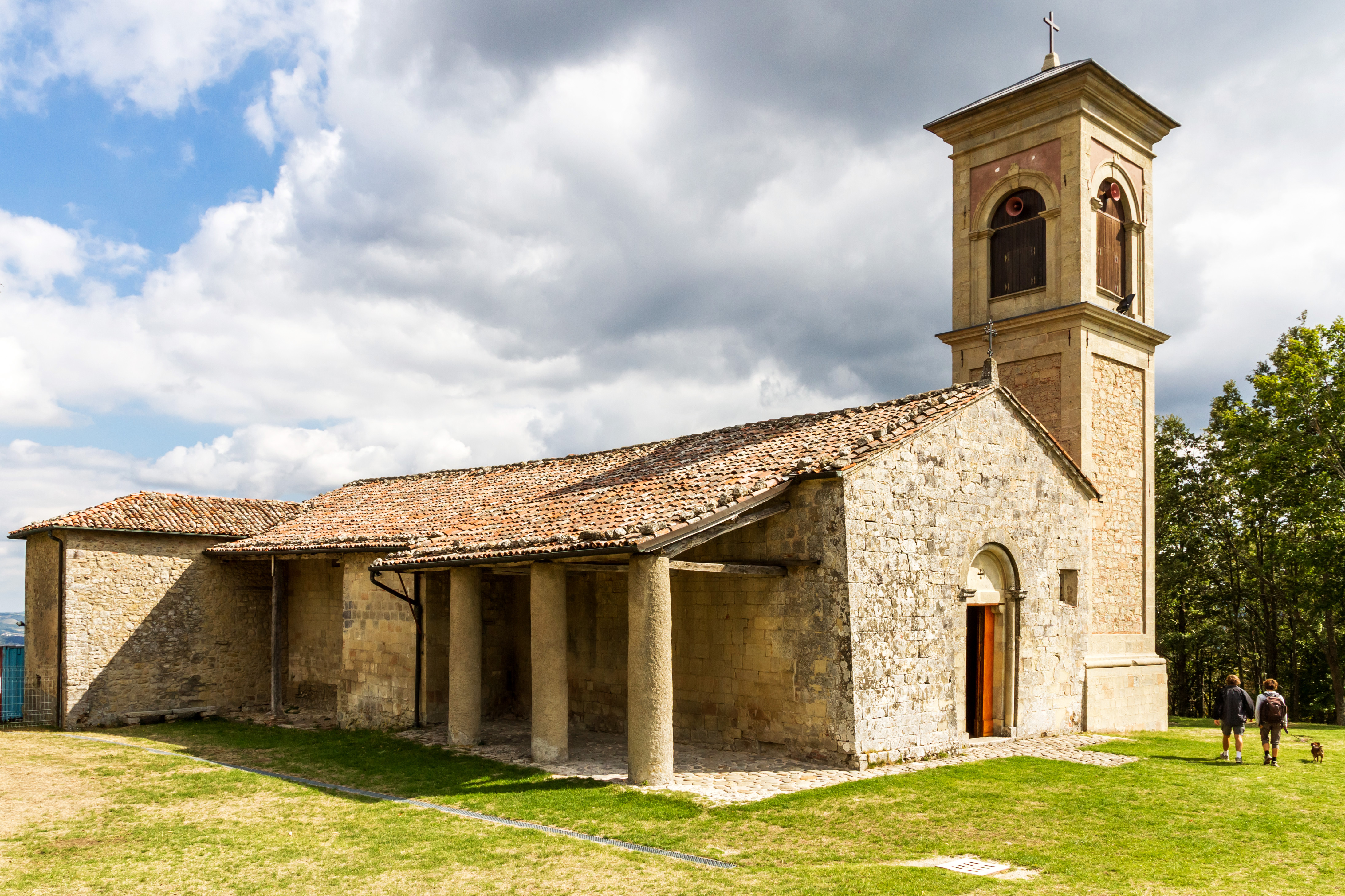 Veduta del Santuario This is a photo of a monument which is part of cultural heritage of Italy. The authorisation for taking photos of this object was provided by the World Wide Fund for Nature Italy.